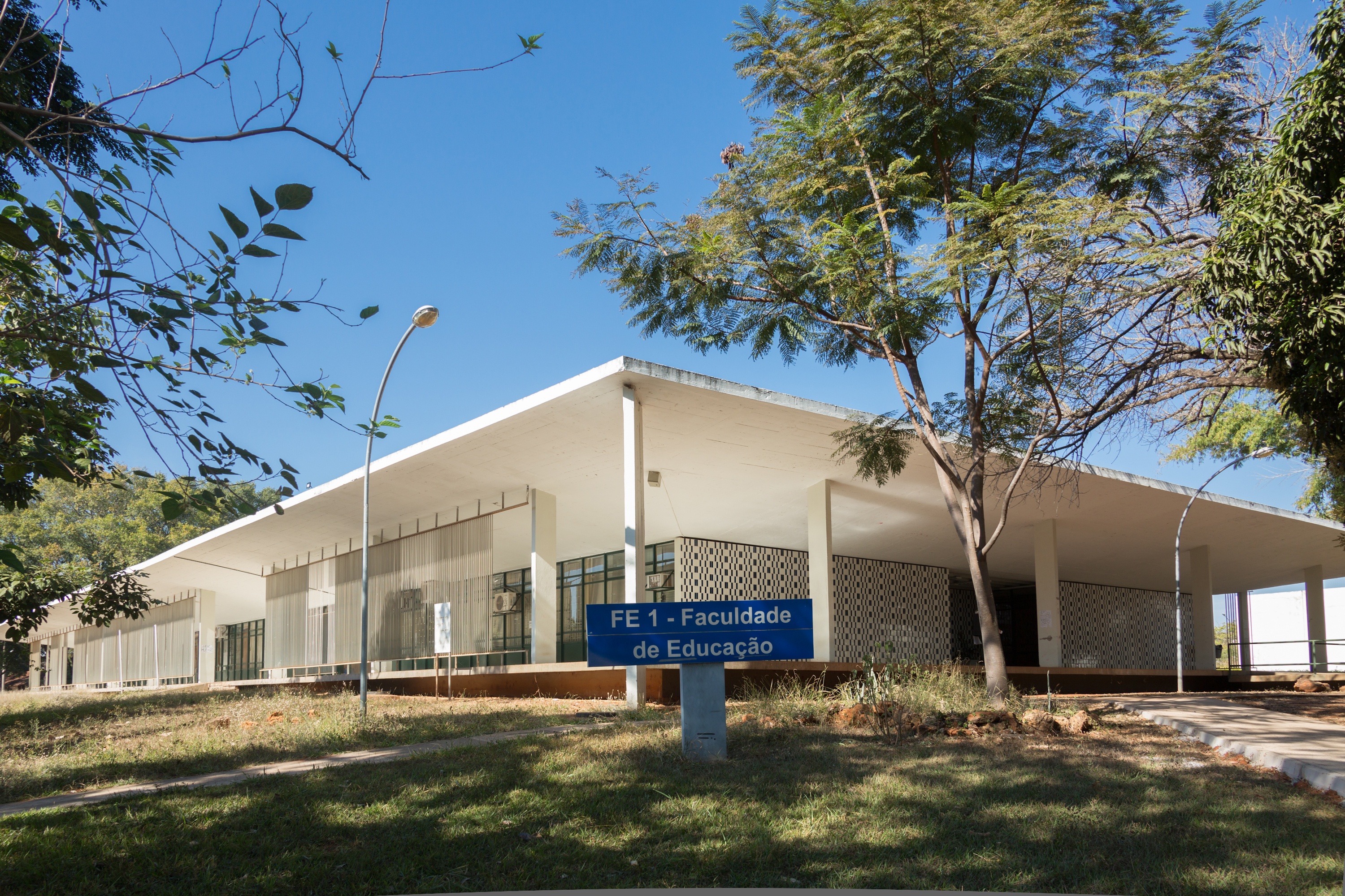 Faculdade de Educação da Unb Foto:Raquel Aviani / Secom UnB. ATENÇÃO – As informações, as fotos e os textos podem ser usados e reproduzidos, desde que a fonte seja devidamente citada e que não haja alteração de sentido em seus conteúdos. Crédito para fotos: nome do fotógrafo/Secom UnB